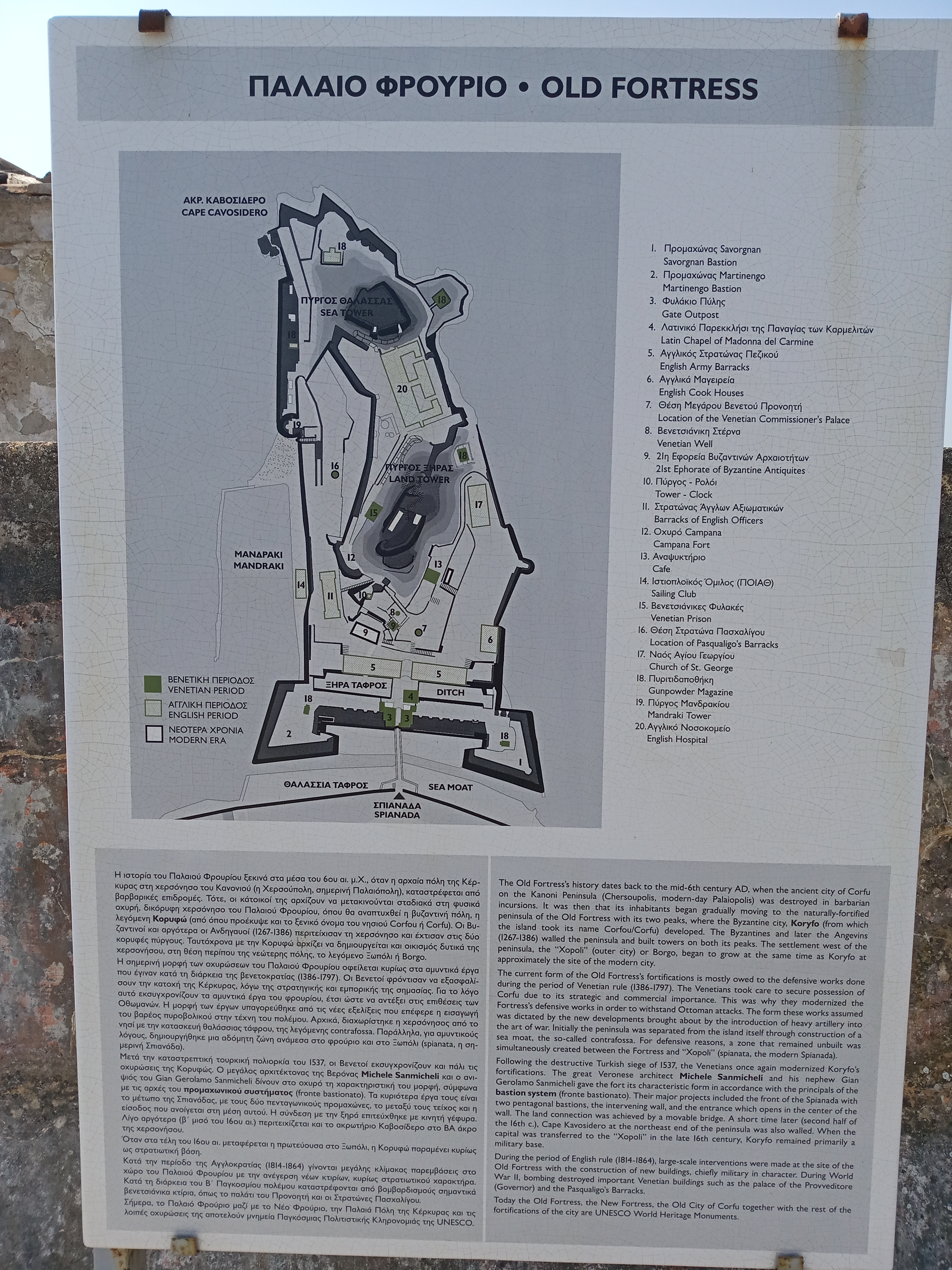 Стара фортеця1 табличка